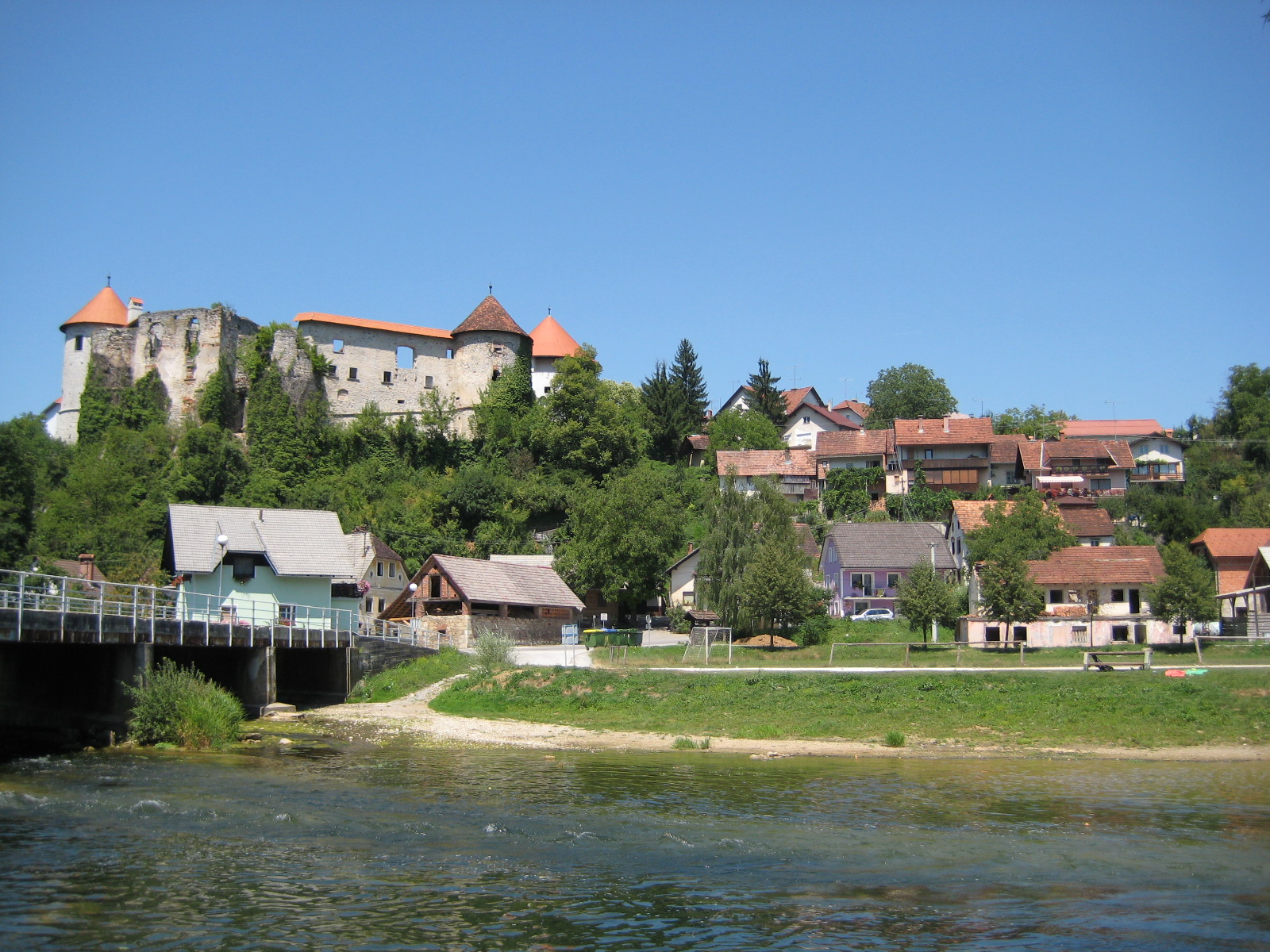 Žužemberk, town in Slovenia (left:Žužemberk castle)